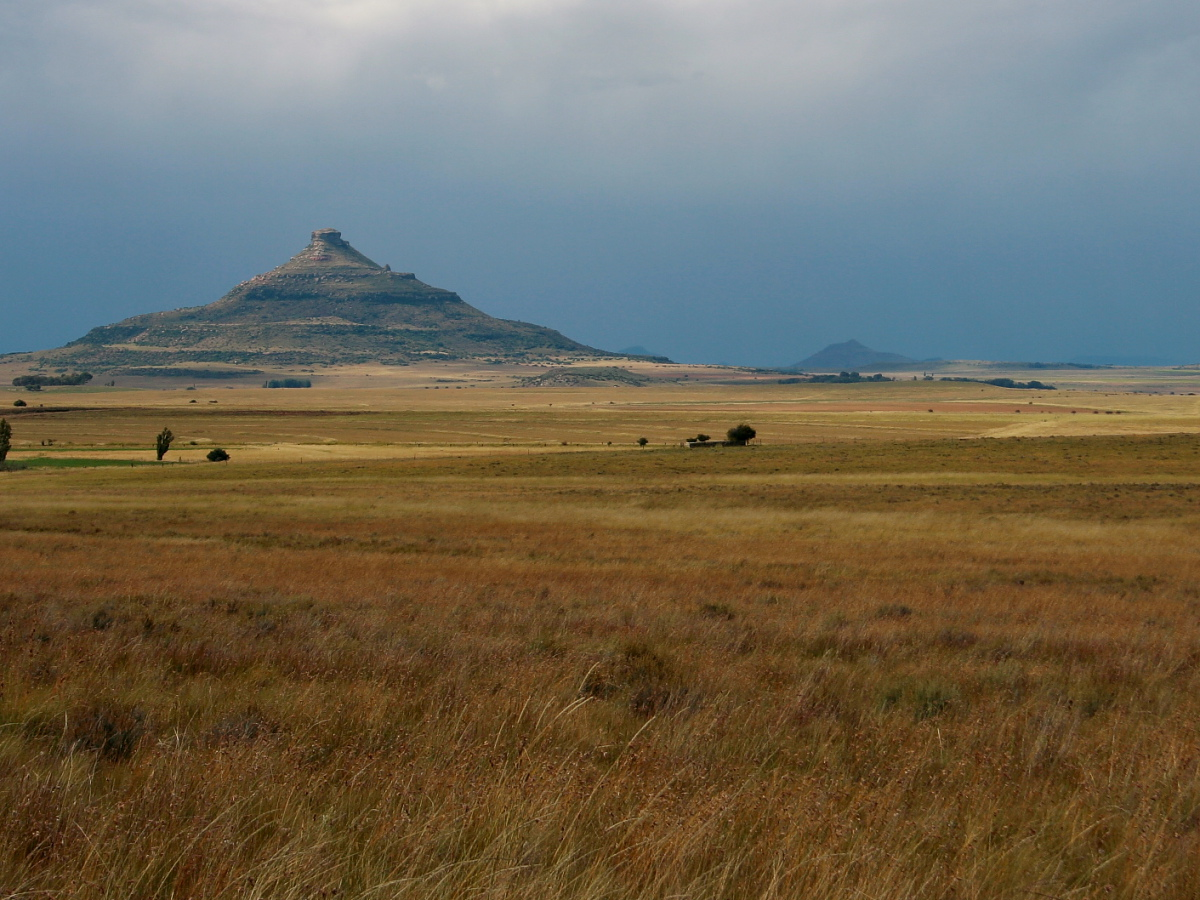 Free State Koppie